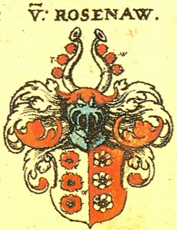 Wappen der Fränkischen Adelsfamilie Rosenau